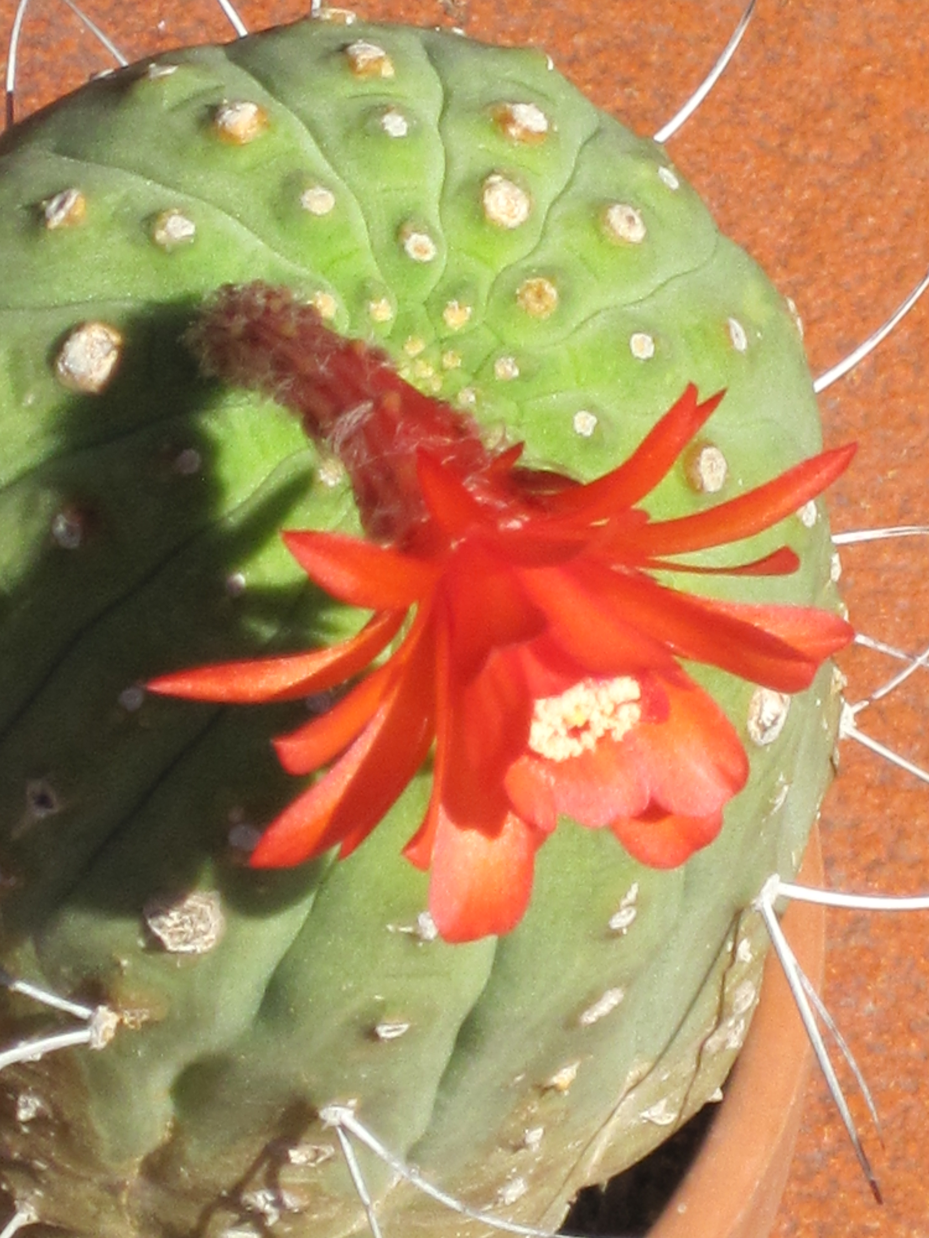 Il fiore della matucana madisoniorum